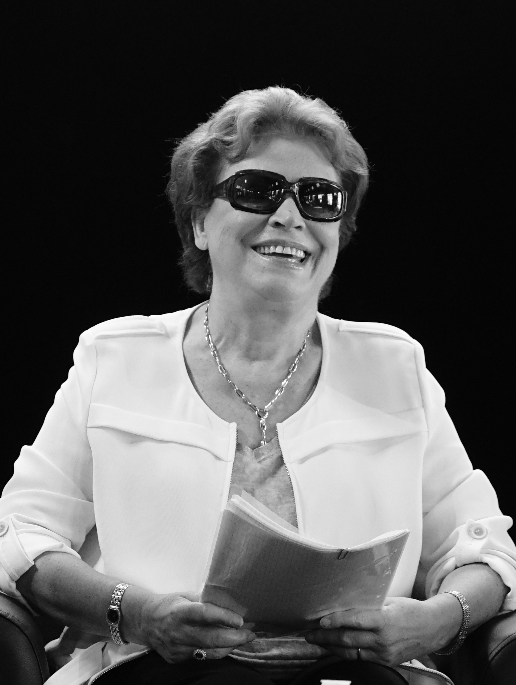 le livre sur la place stan en 2018.